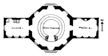 Plan de l'institut d'anatomie Senckenberg à Francfort-sur-le-Main.